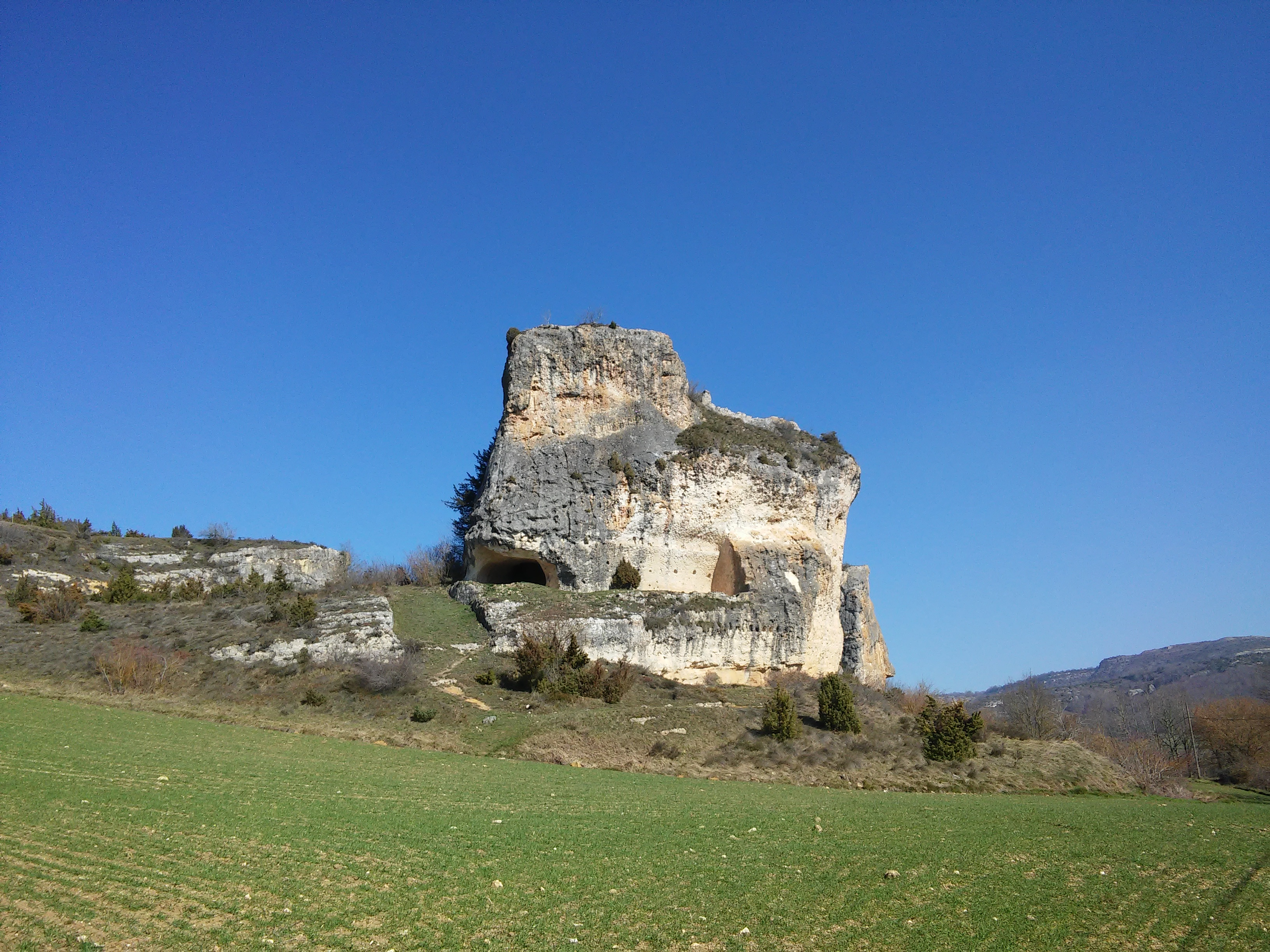 Markiz (Araba) herriko Gazteluaren haitza, edo Arluzea